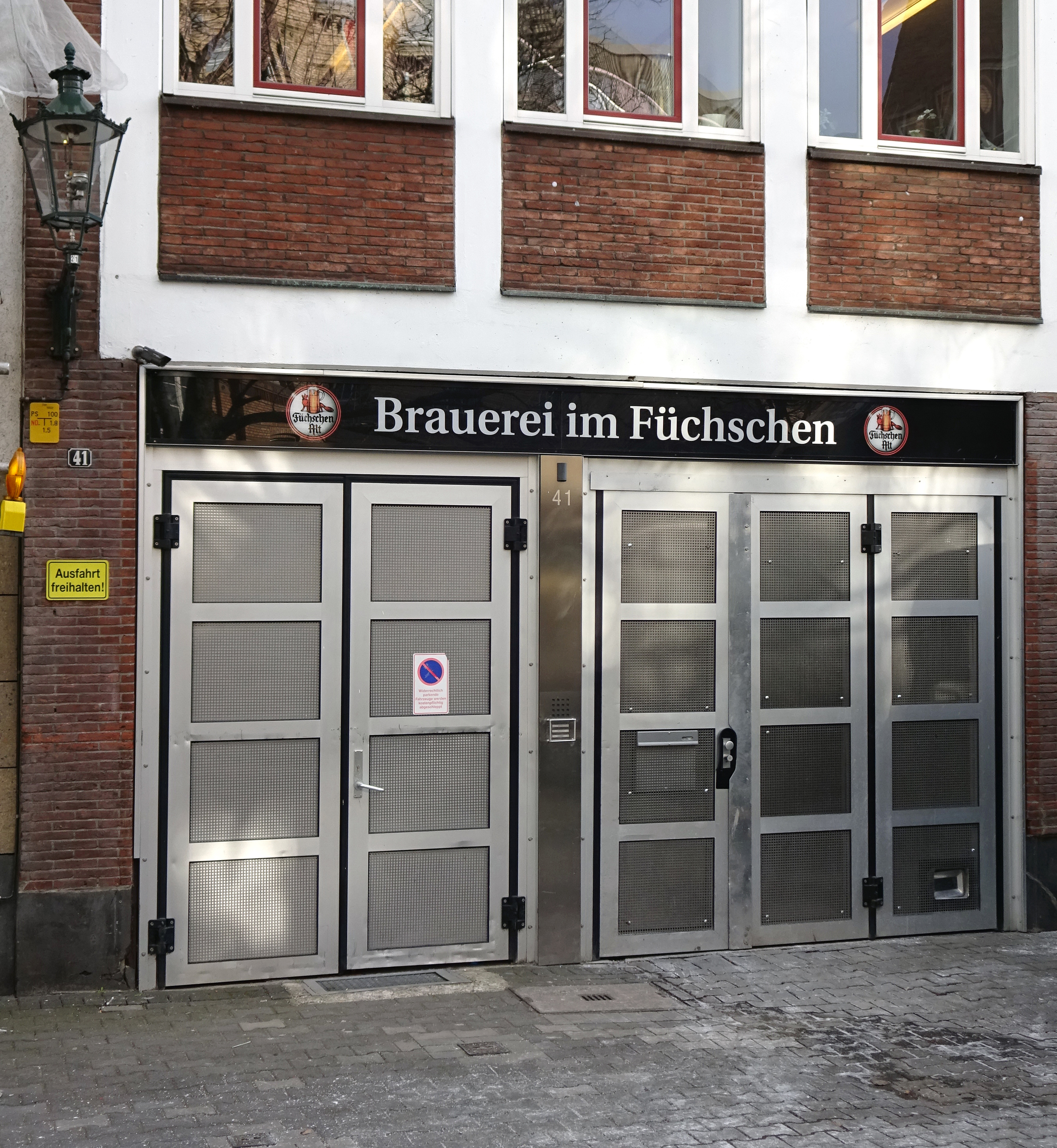 Brauerei im Füchschen, Zugang Ritterstraße 41, Düsseldorf-Altstadt